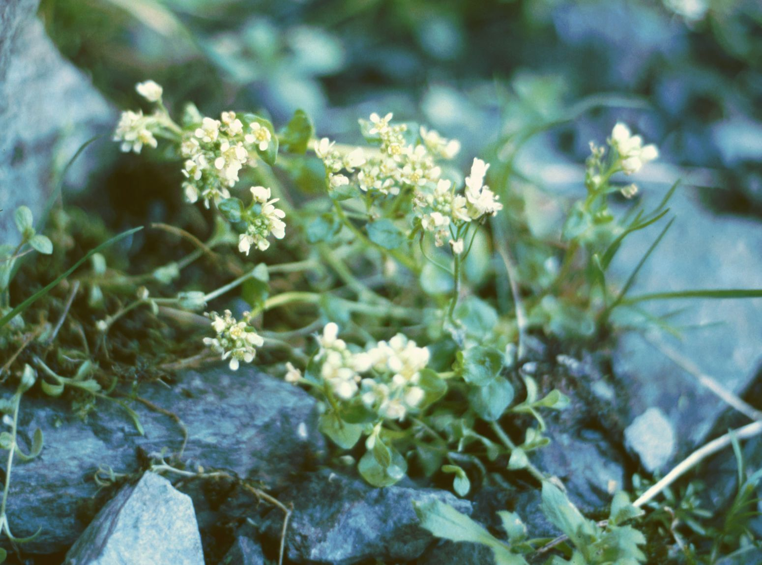 Alpen-Löffelkraut (Cochlearia excelsa), Kreuzblütler (Brassicaceae) - Österreich/Austria/Autriche: Kärnten, Gurktaler Alpen, Wintertaler Nock